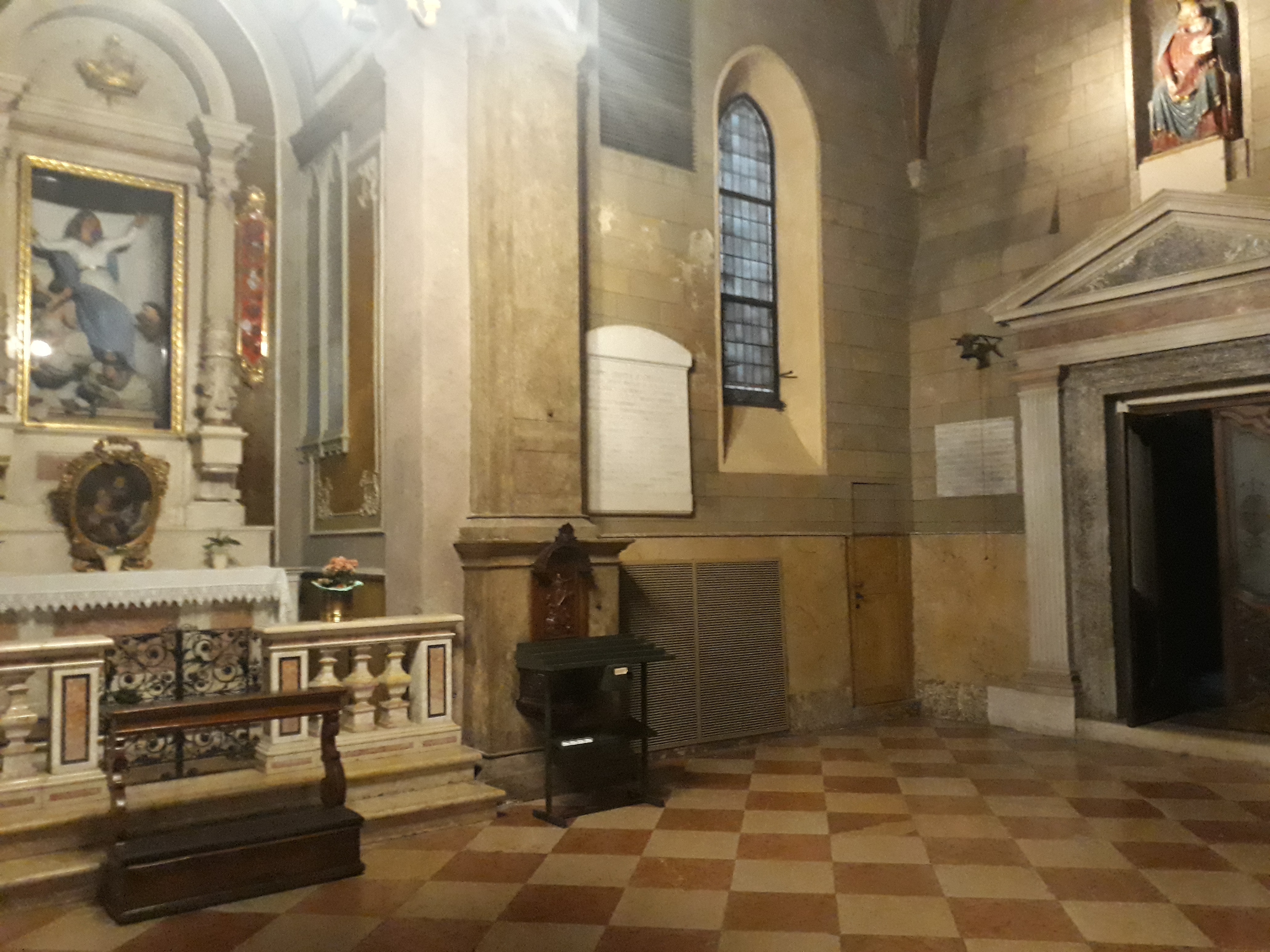 Transetto di destra della chiesa dei Santi Nazaro e Celso a Verona. Sulla sinistra la cappella della Vergine Assunta